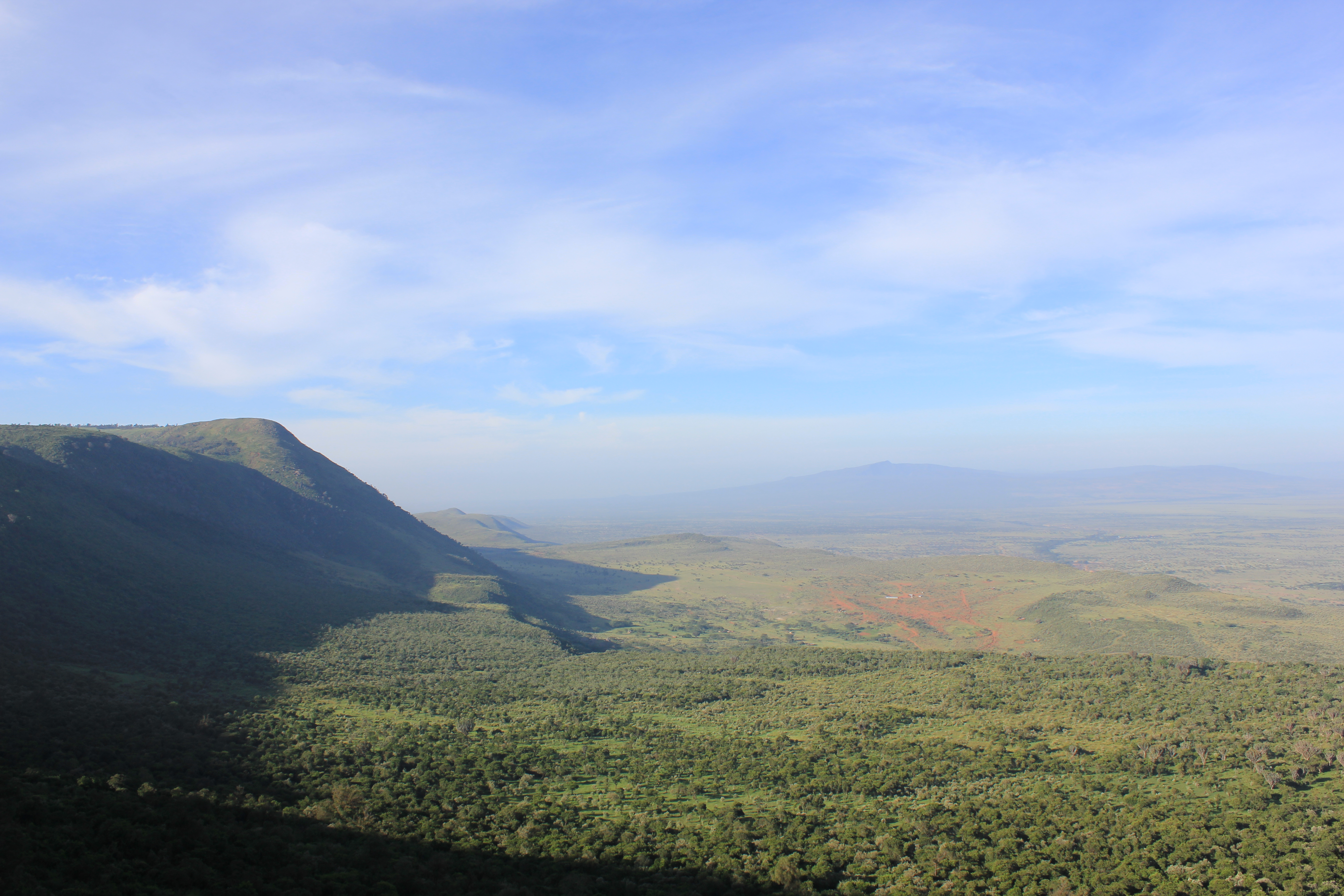 Lake Nakuru National Park